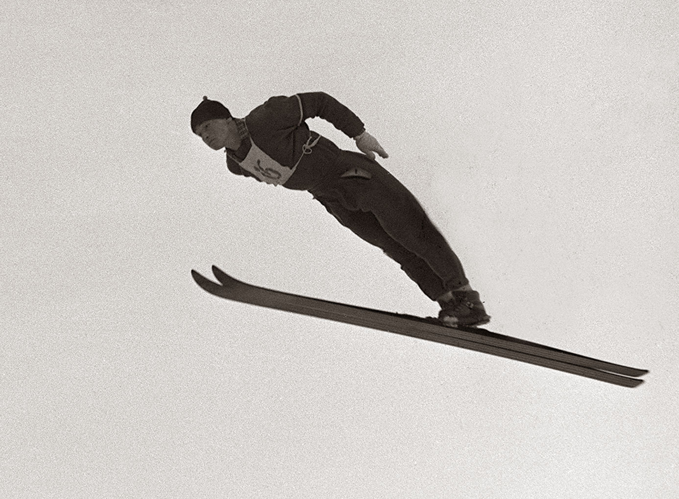 Miro Oman